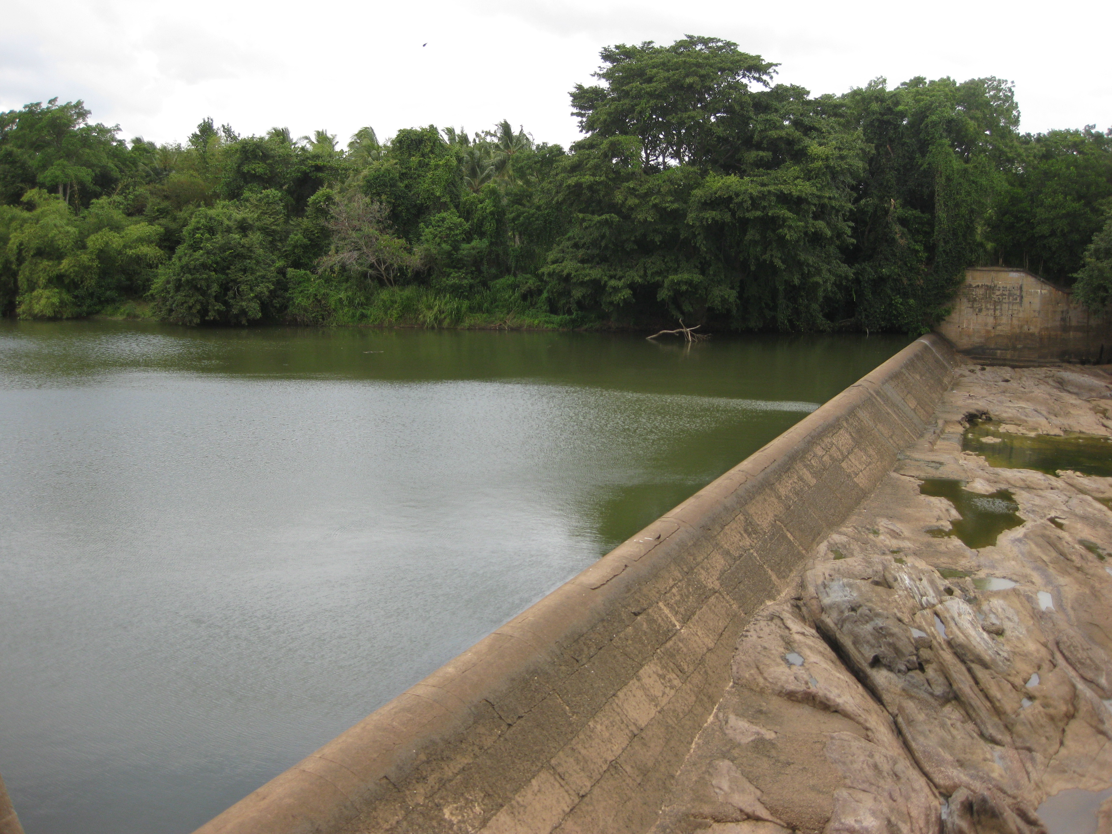 සිංහල: ශ්‍රී ලංකාවේ කුරුණෑගල දිස්ත්‍රික්කයේ පිහිටි රිදීබැඳිඇල්ල අමුණ